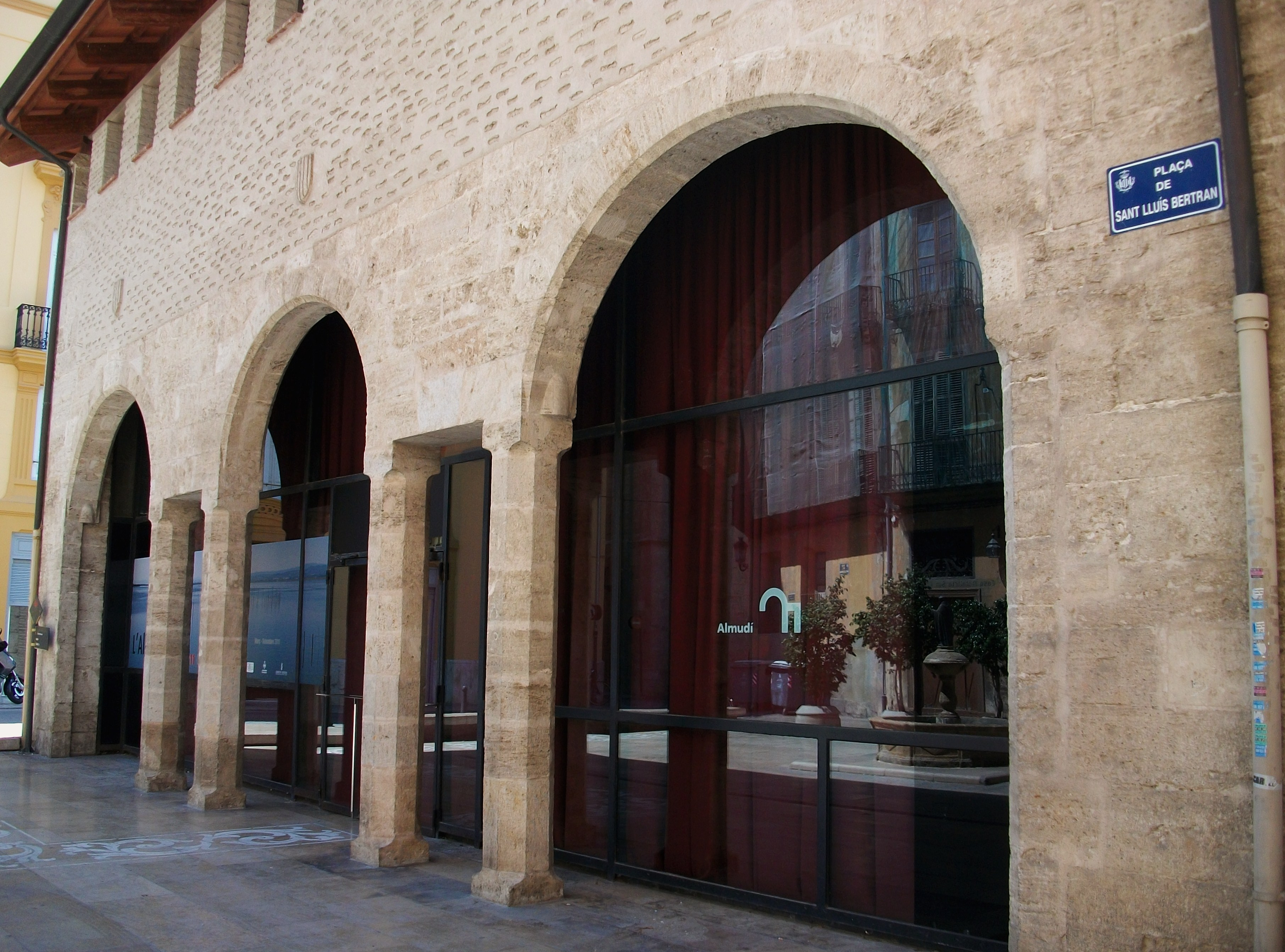 Porxada de l'almodí de València.